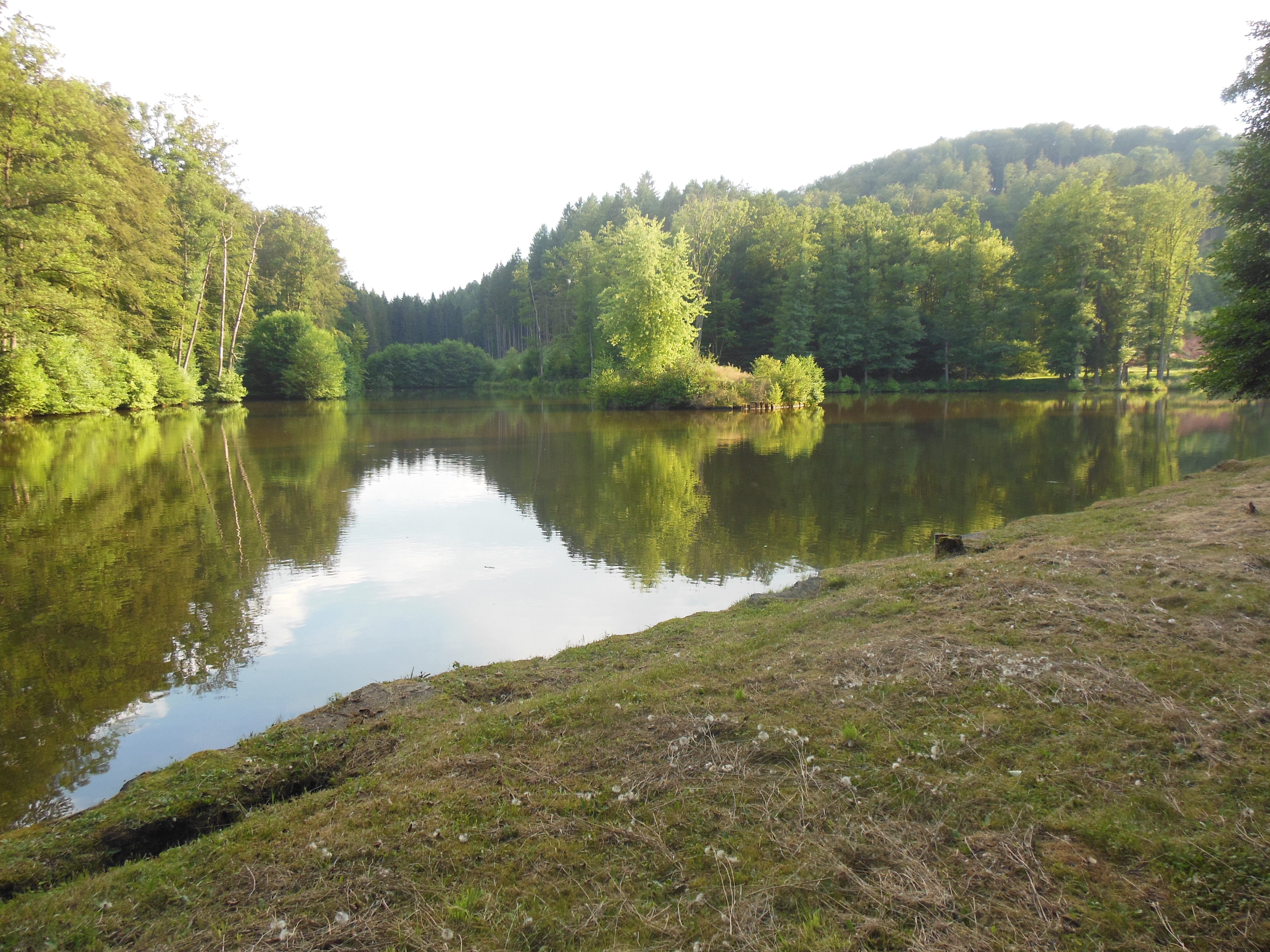 Vue sur l'étang du Loeschersbach depuis le nord